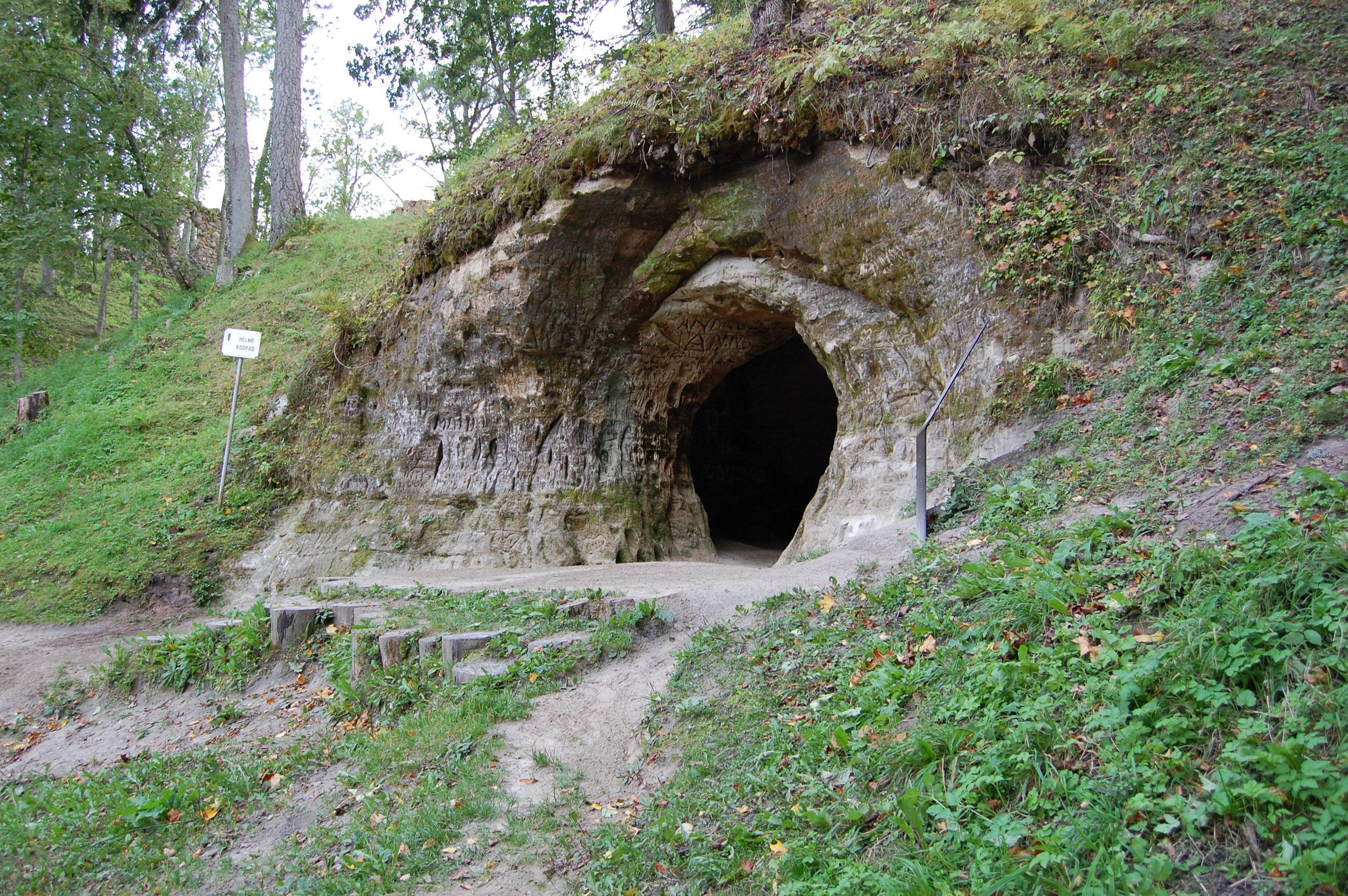 Helme Linnuse põhja kaldas asuvad koopad. Pildil kõige suurema koopa ava